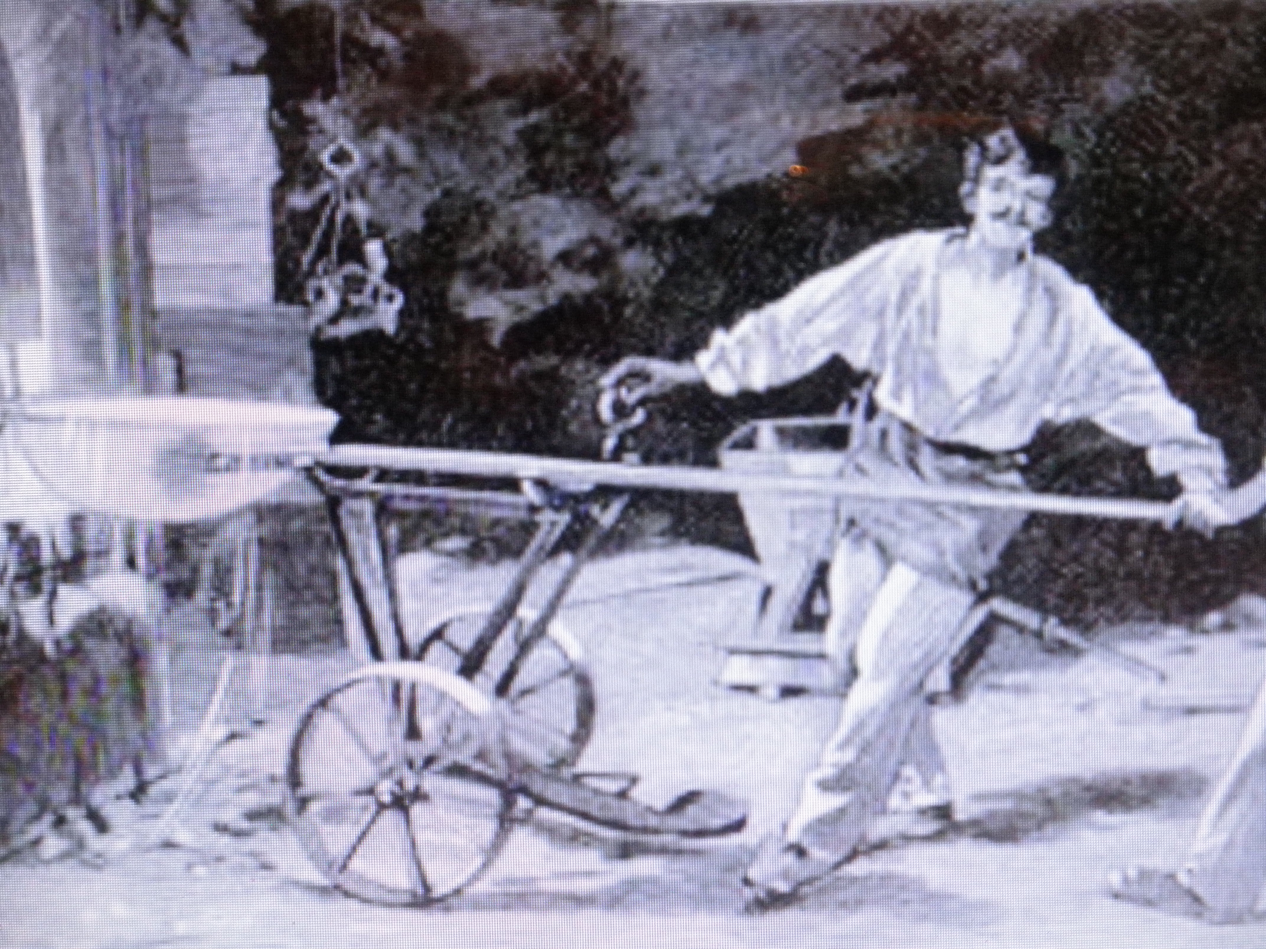 1898 cuiller